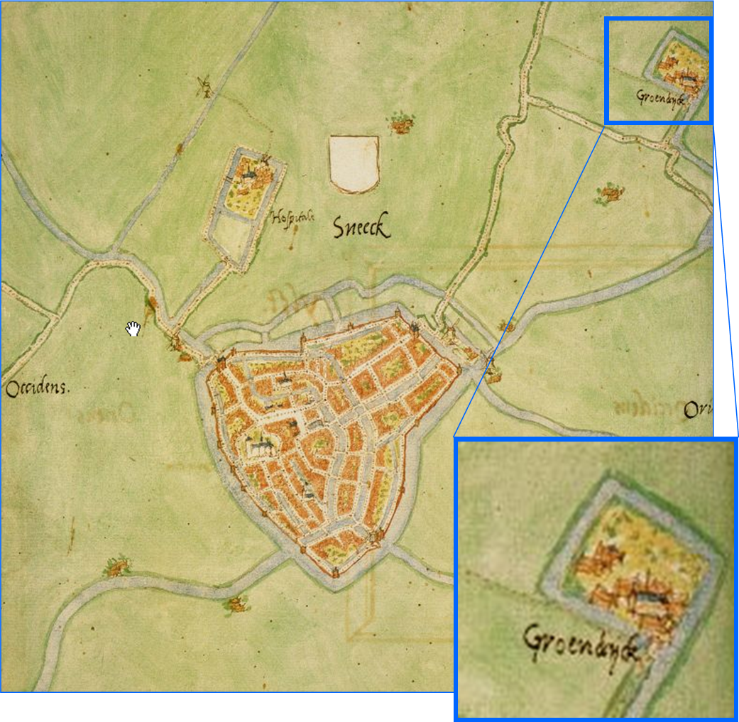 Monastery Groendijk on map made by Jacob van Deventer